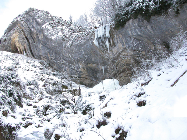 Chapeau de Gendarme. Lacets de 7moncel